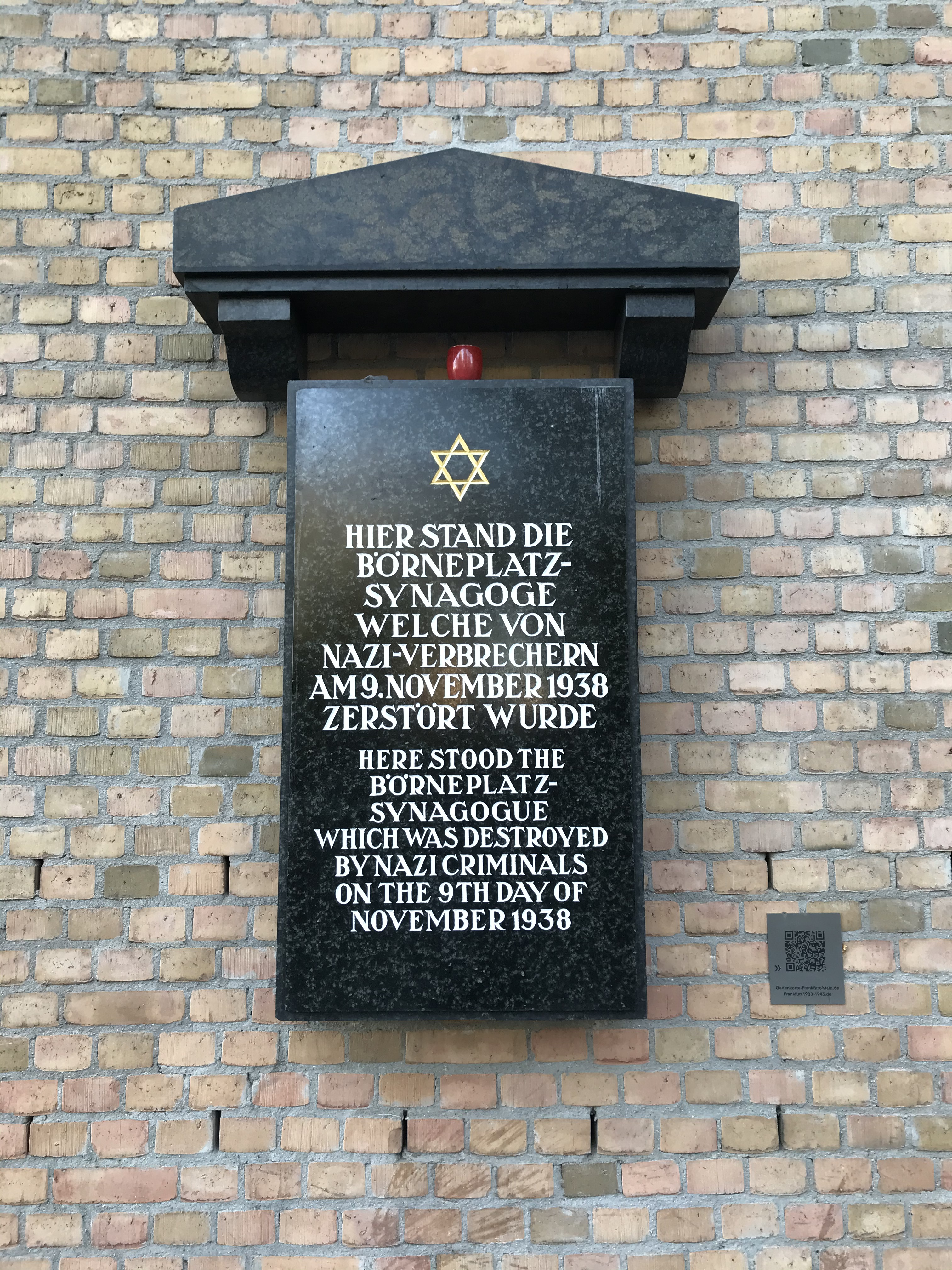 Synagoge am Börne-Platz in Frankfurt am Main